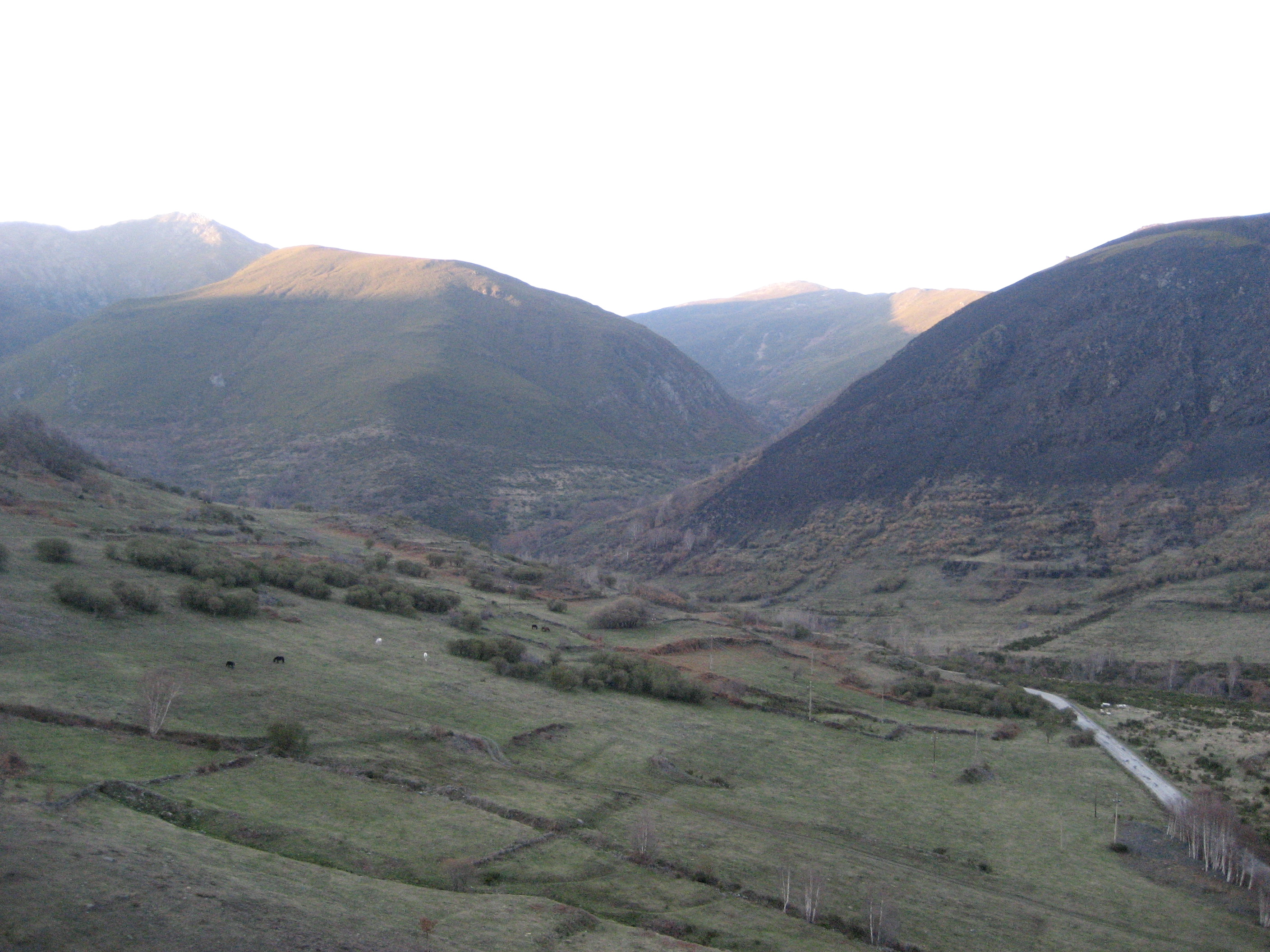 Valle de Fornela cerca de Chano (León, España).